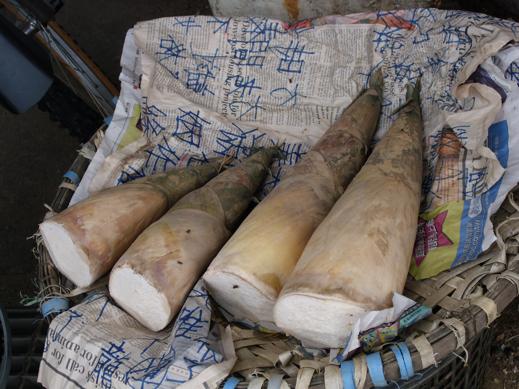 臺中市潭子區，用臺灣蘋果日報與英文臺北時報舊報紙鋪的麻竹筍。